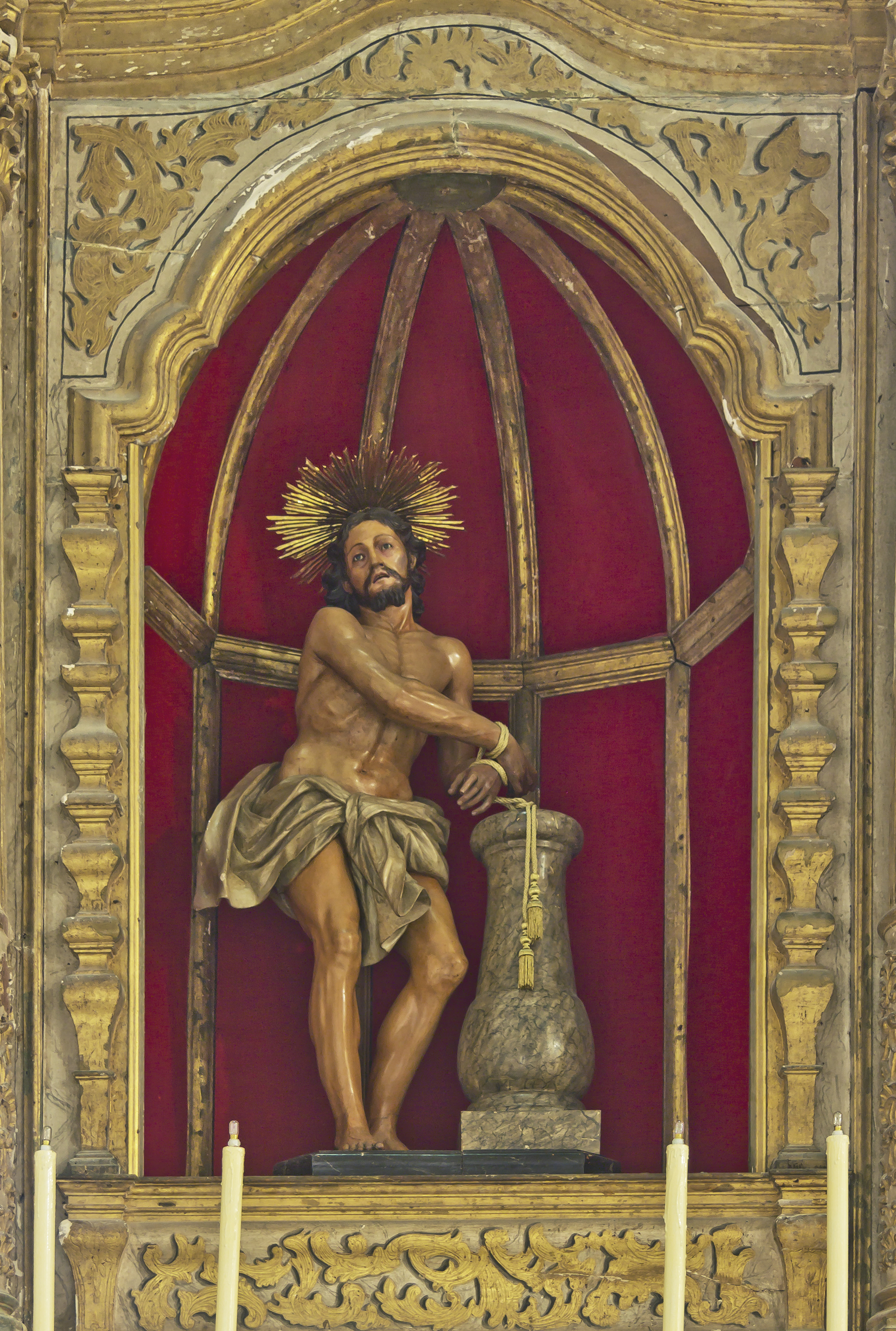 Cristo atado a la columna del escultor Pietro Galliano